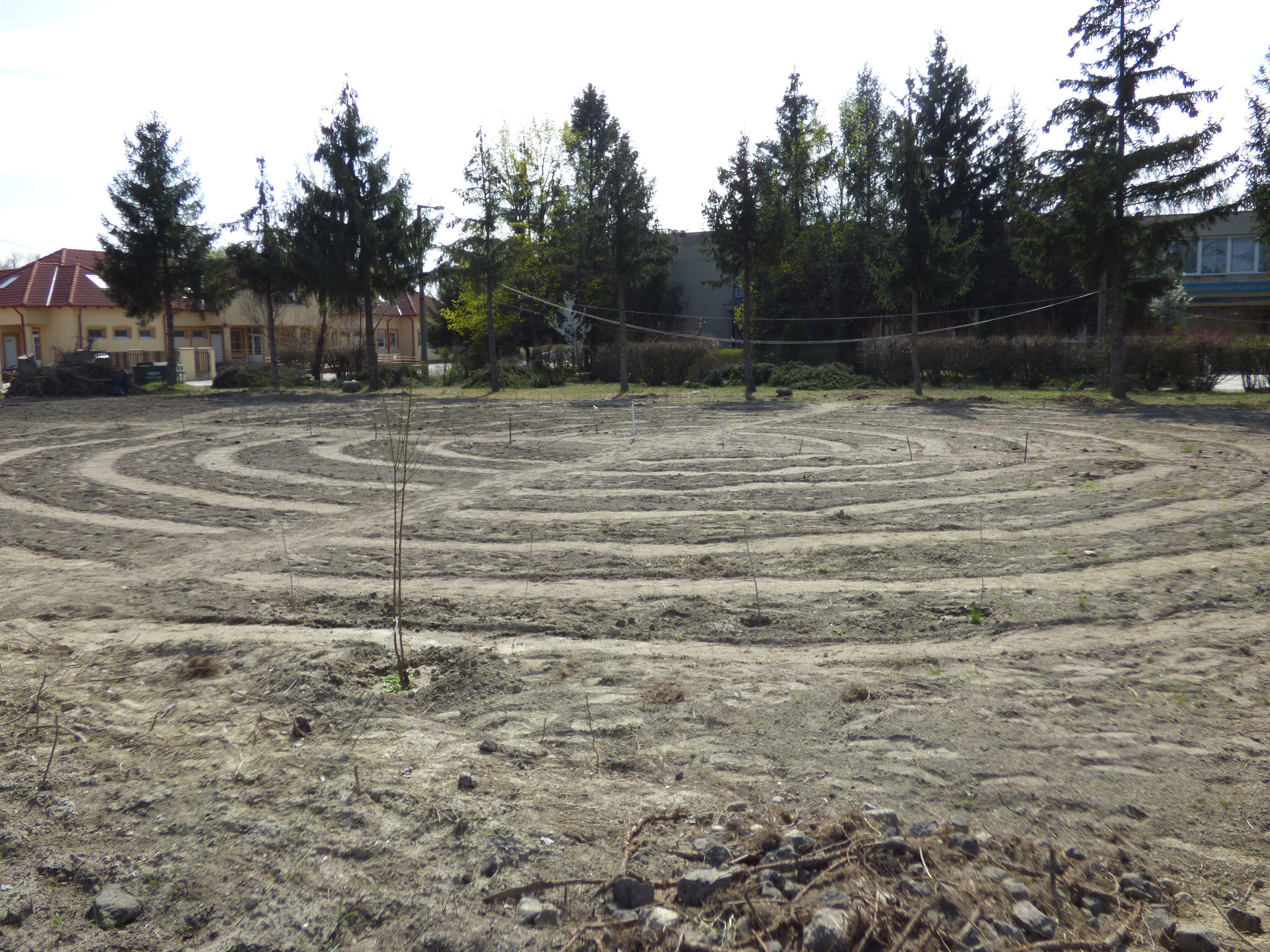 Körkörös ágyás a szigethalmi BIO kert területén. A Knorr-Bremse Hungary Kft. és Szigethalom Város Önkormányzata együttműködése keretében, 2016-ban jött létre [1] A háttérben a Szigethalom Egyesített Népjóléti Intézmény épülete amelyik volt légvédelmi laktanya helyén található és az idősek gondozását, bentlakásos, nappali és házigondozó szolgáltatást biztosít. Hozzá tartozik a Fogyatékkal Élők Nappali Intézete.[2] - Pest megye, Szigethalom, Rákóczi utca kb. 147.